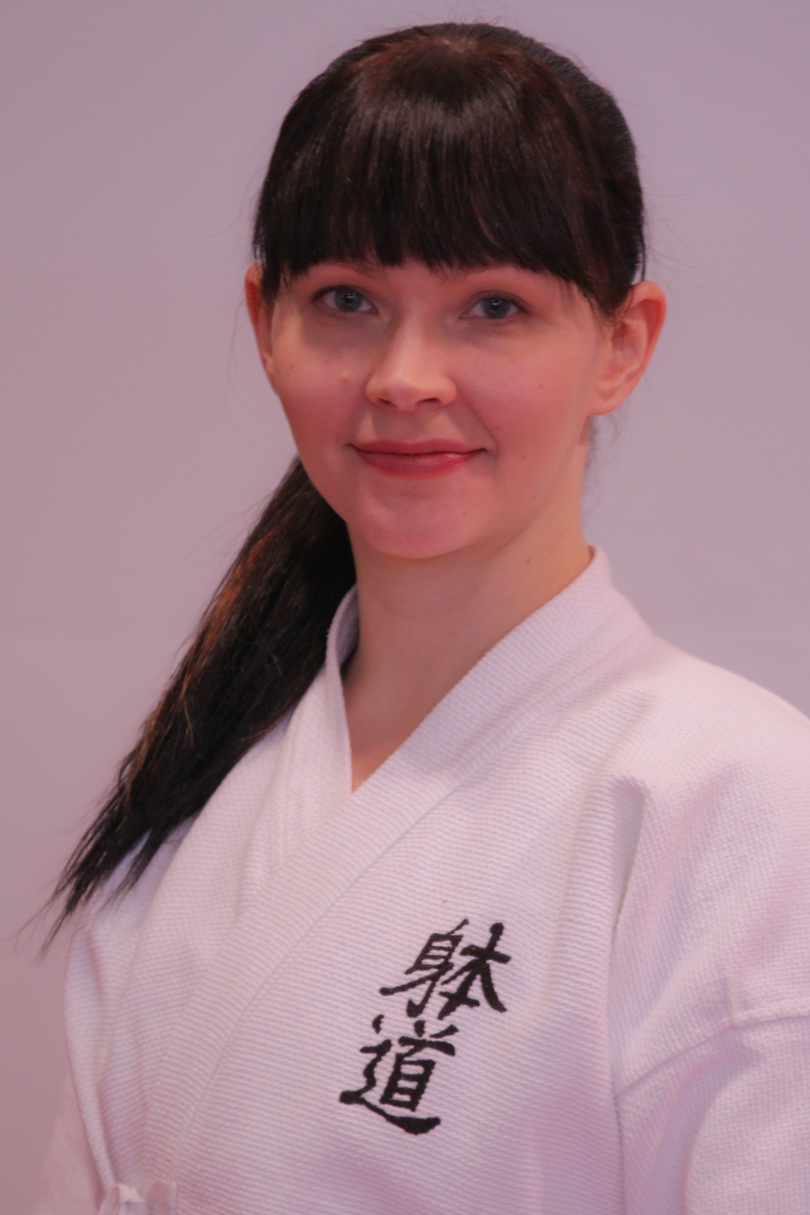 Laura Pellikka